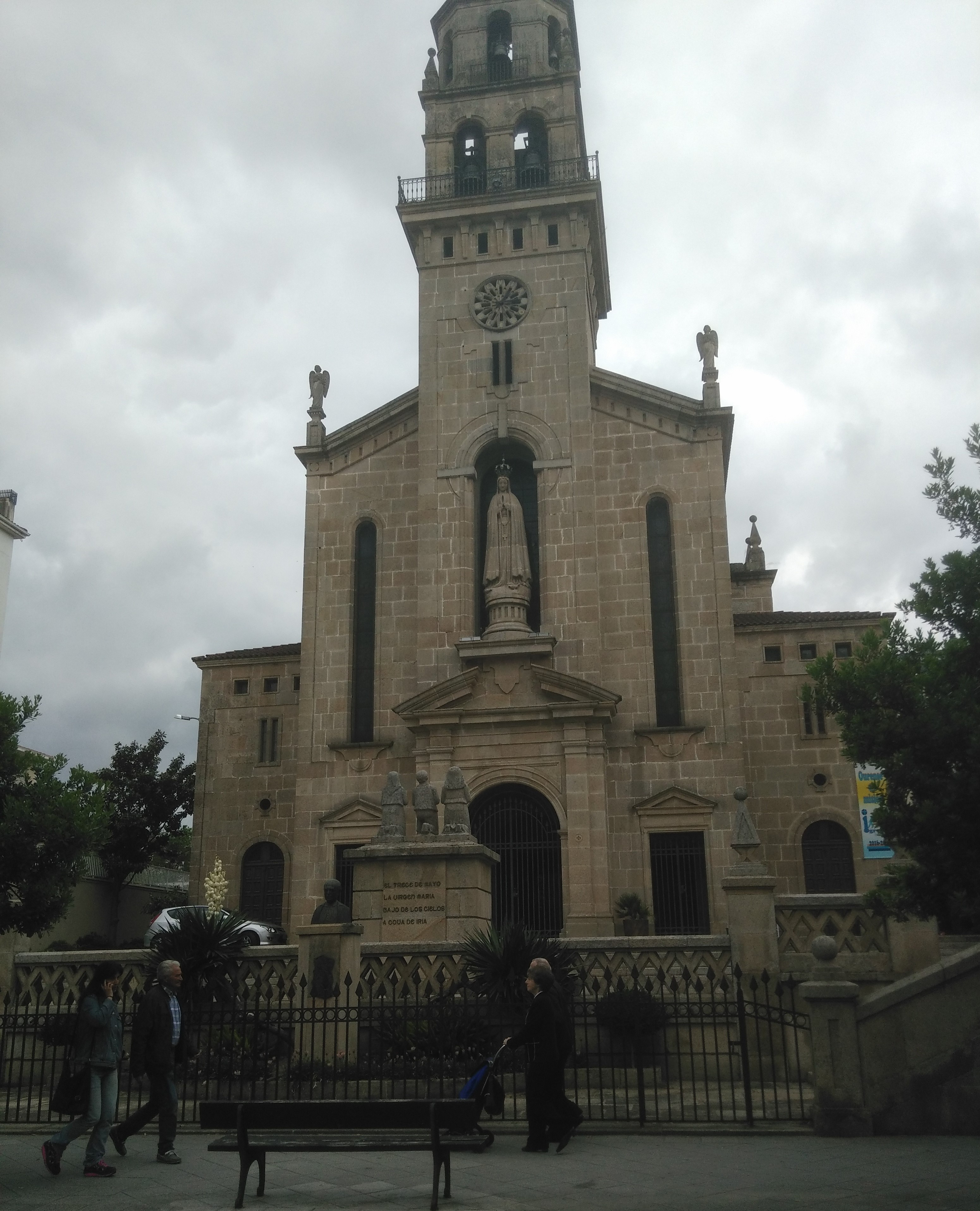 Iglesia católica de Nuestra Señora de Fátima.